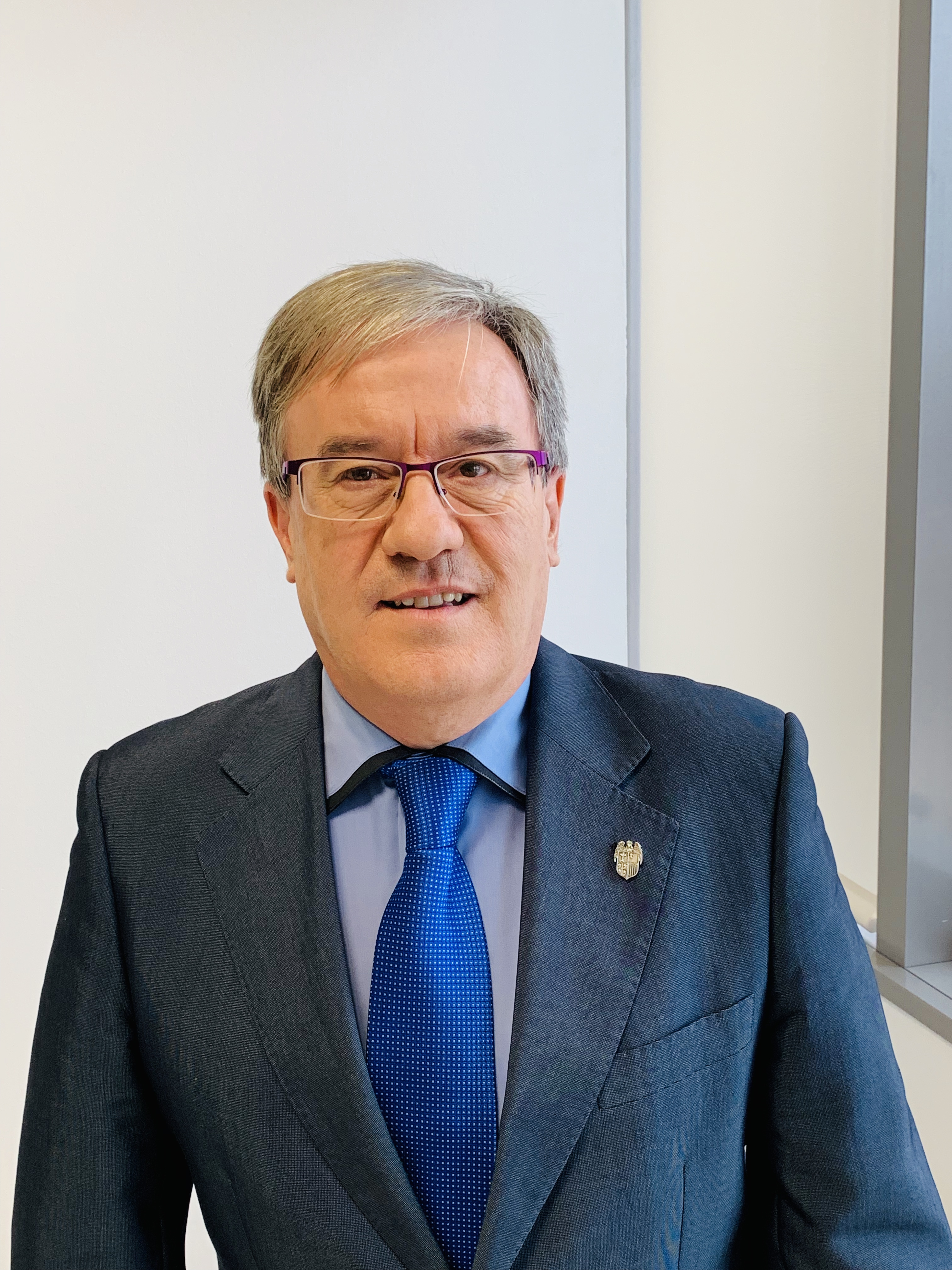 Fotografía del actual Justicia de Aragón